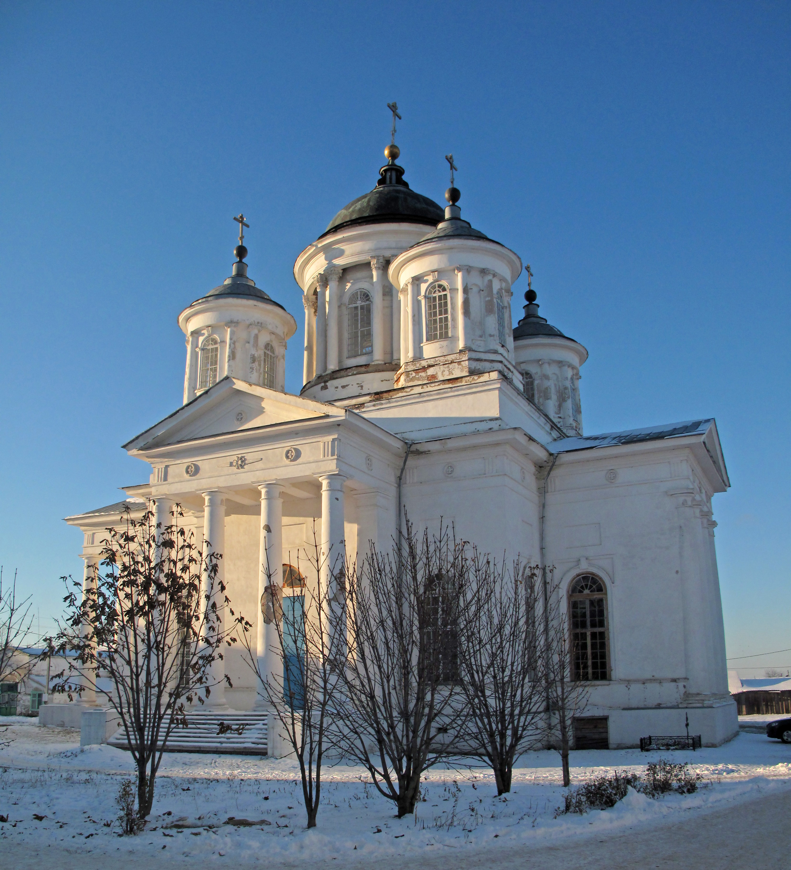 Церковь Вознесения Господня (Нижегородская область, Лысково, переулок Шапошникова, 7а)